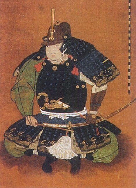 榊原康政。Sakakibara Yasumasa.